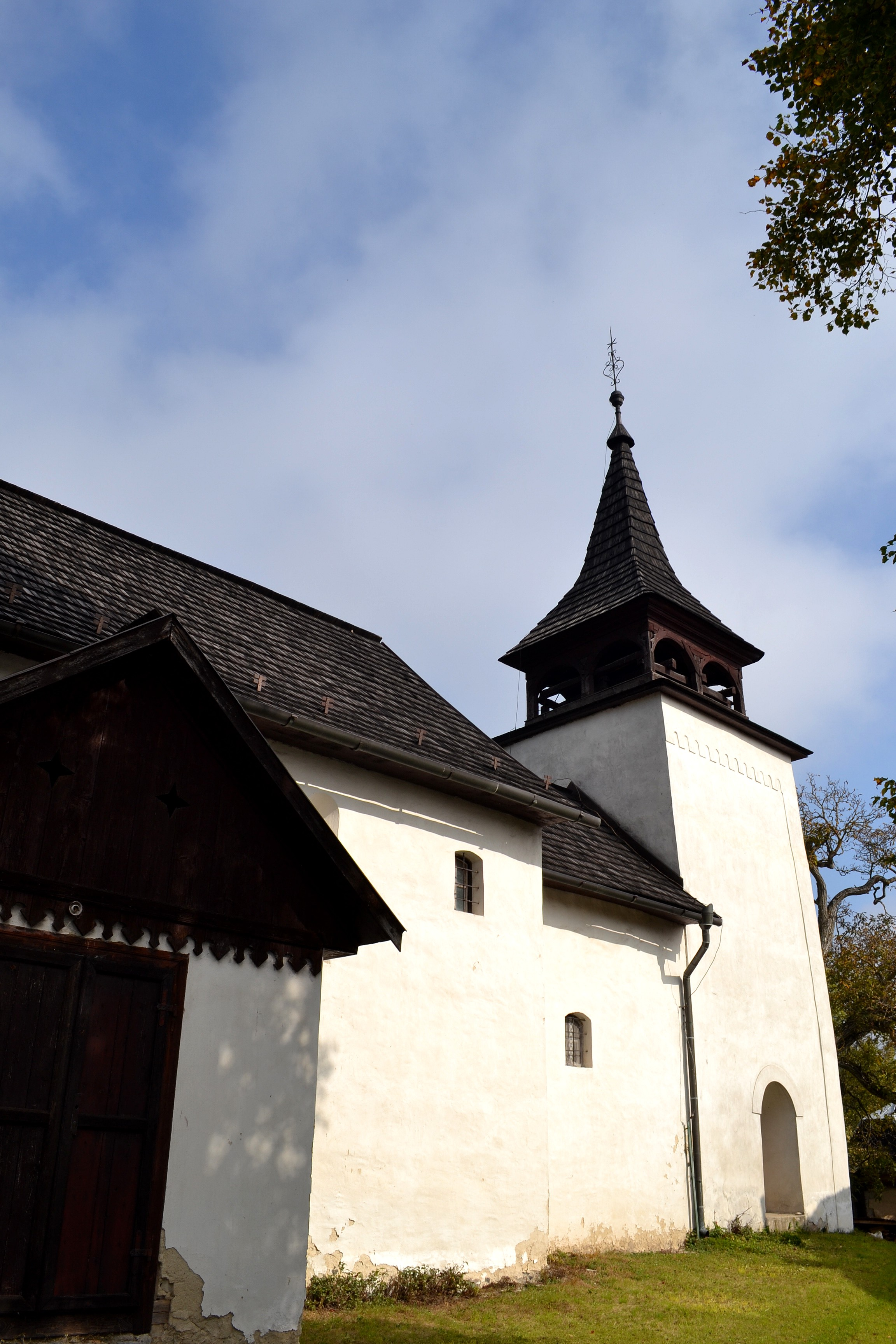 Evanjelický kostol v Kyjaticiach pochádza z prelomu 13. a 14. stor. Pohľad na kostolík od juhozápadu